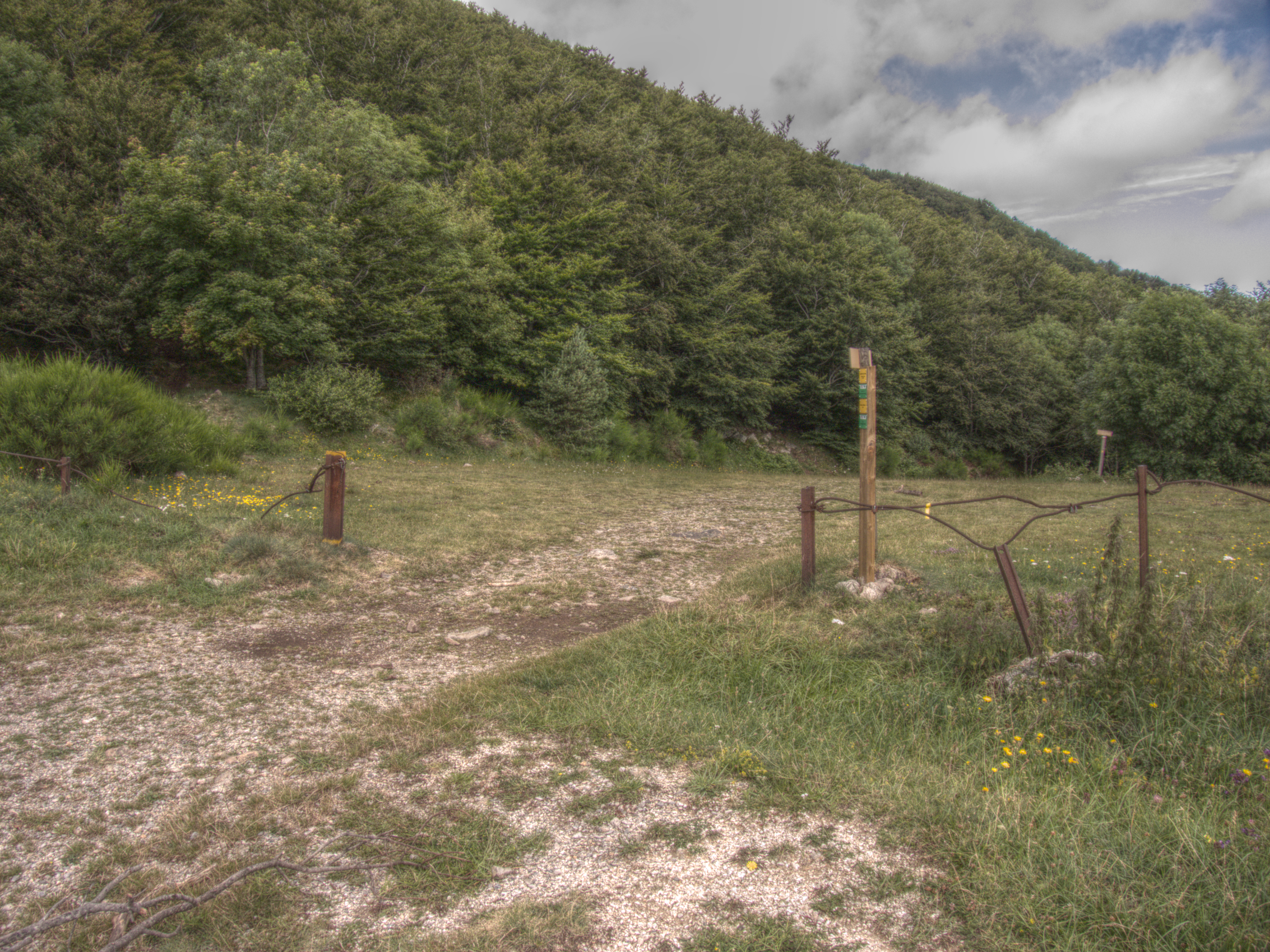 Frontière depuis l'Espagne au Col du Puits de la Neige, Maçanet de Cabrenys (Haut-Ampurdan, Gérone, Catalogne, Espagne), Céret (Pyrénées-Orientales, Languedoc-Roussillon, France)